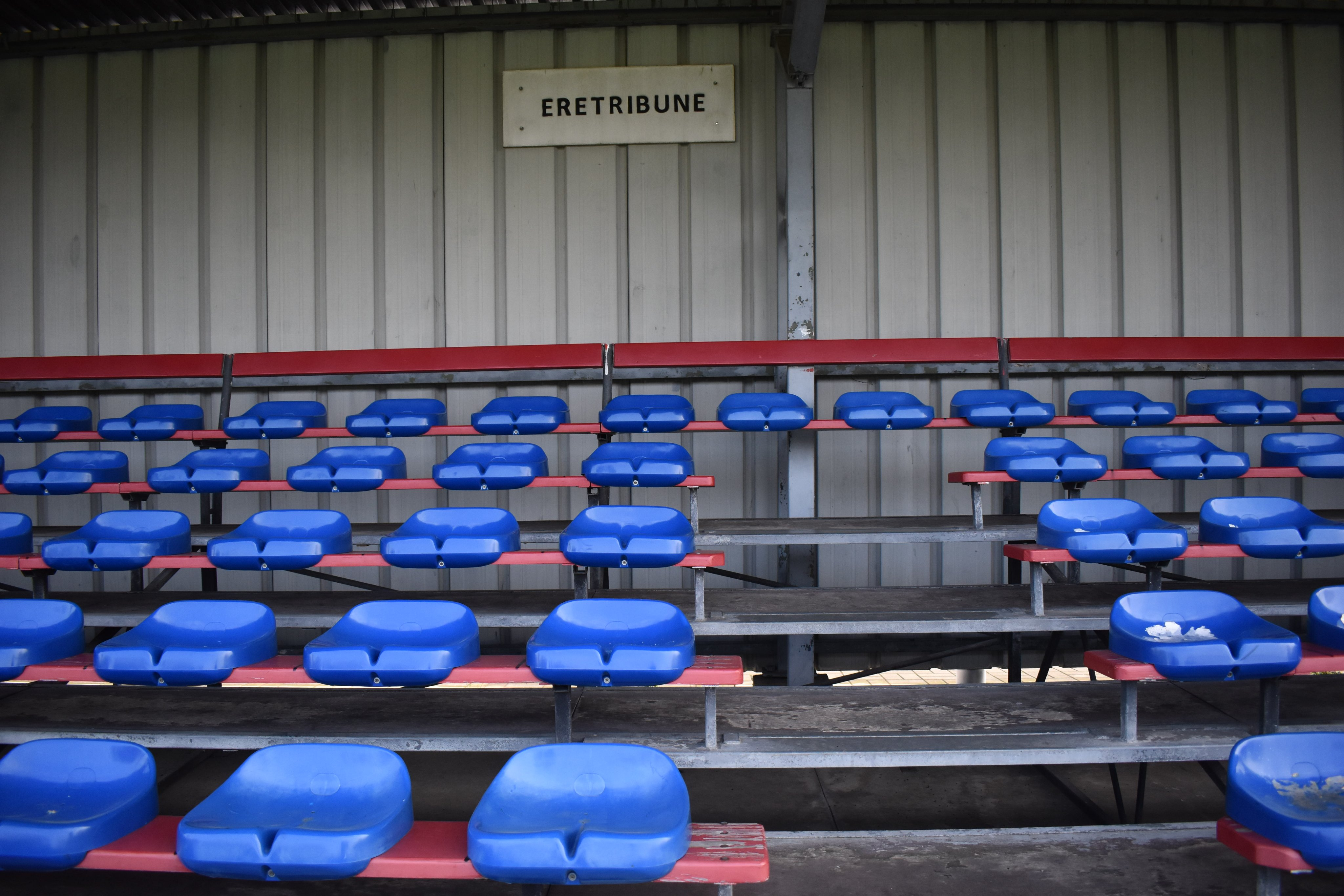 eretribune